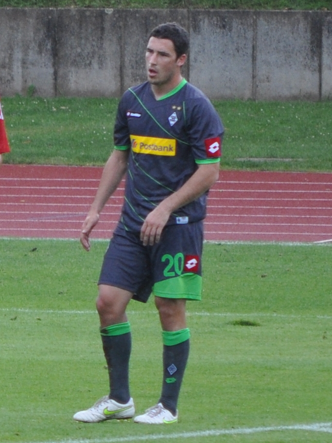 Mathew Lecke im Test gegen Aberdeen